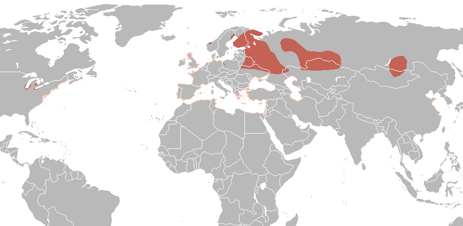 Little Gull (Larus minutus) distribution map